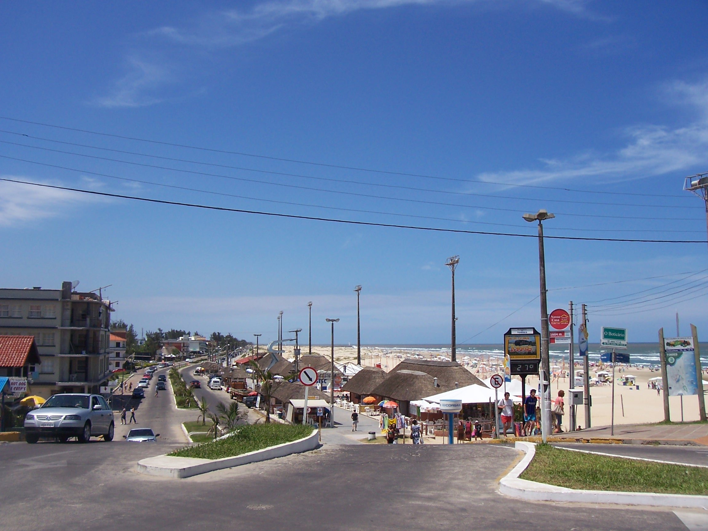 Avenida Beira Mar no Torres, Rio Grande do Sul, Brasil.